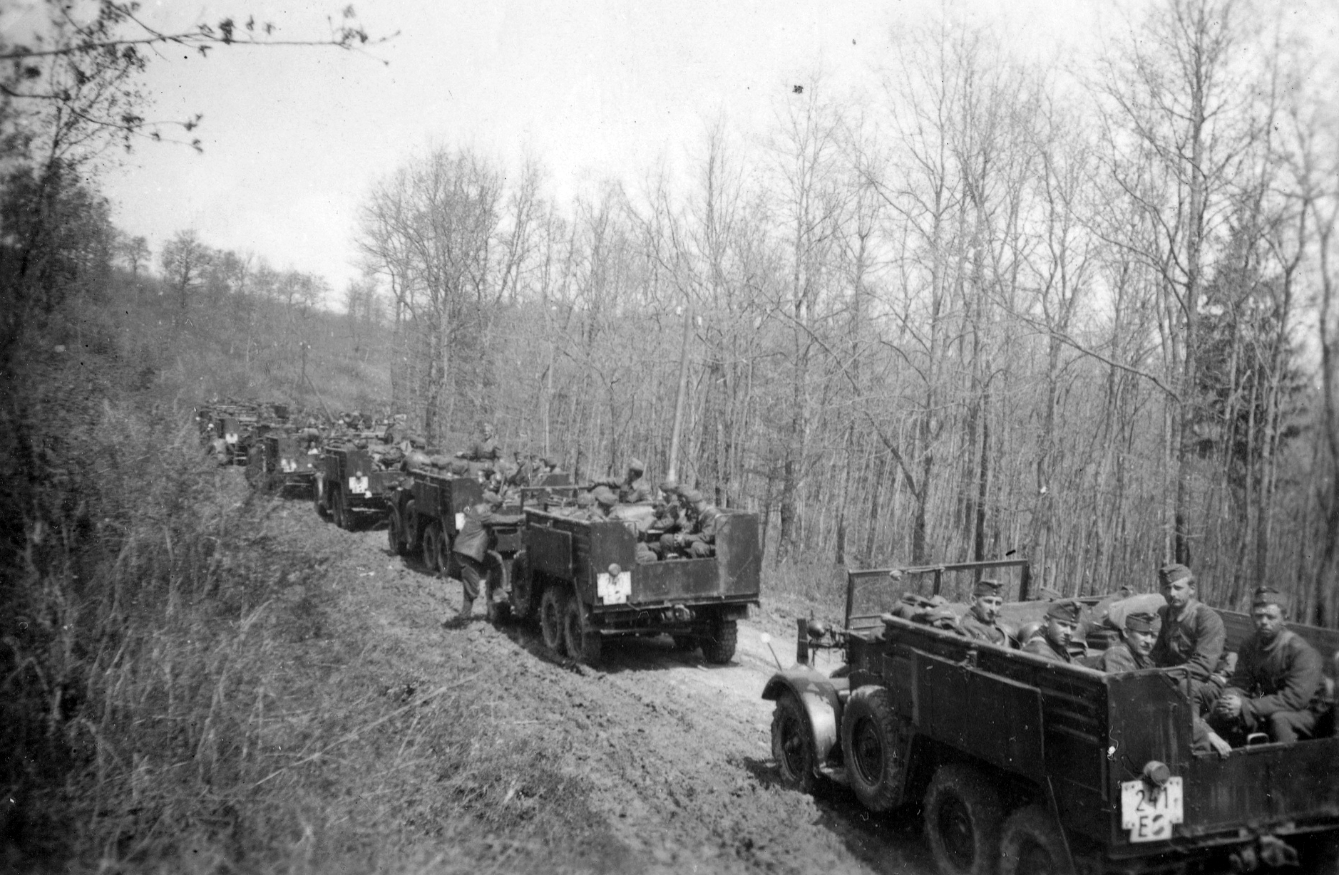 Krupp Kfz. 70 (Protze) teherautók és tüzérségi vontatók. Tags: military, second World War, eastern front, commercial vehicle, number plate, military number plate Title: Krupp Kfz. 70 (Protze) teherautók és tüzérségi vontatók.